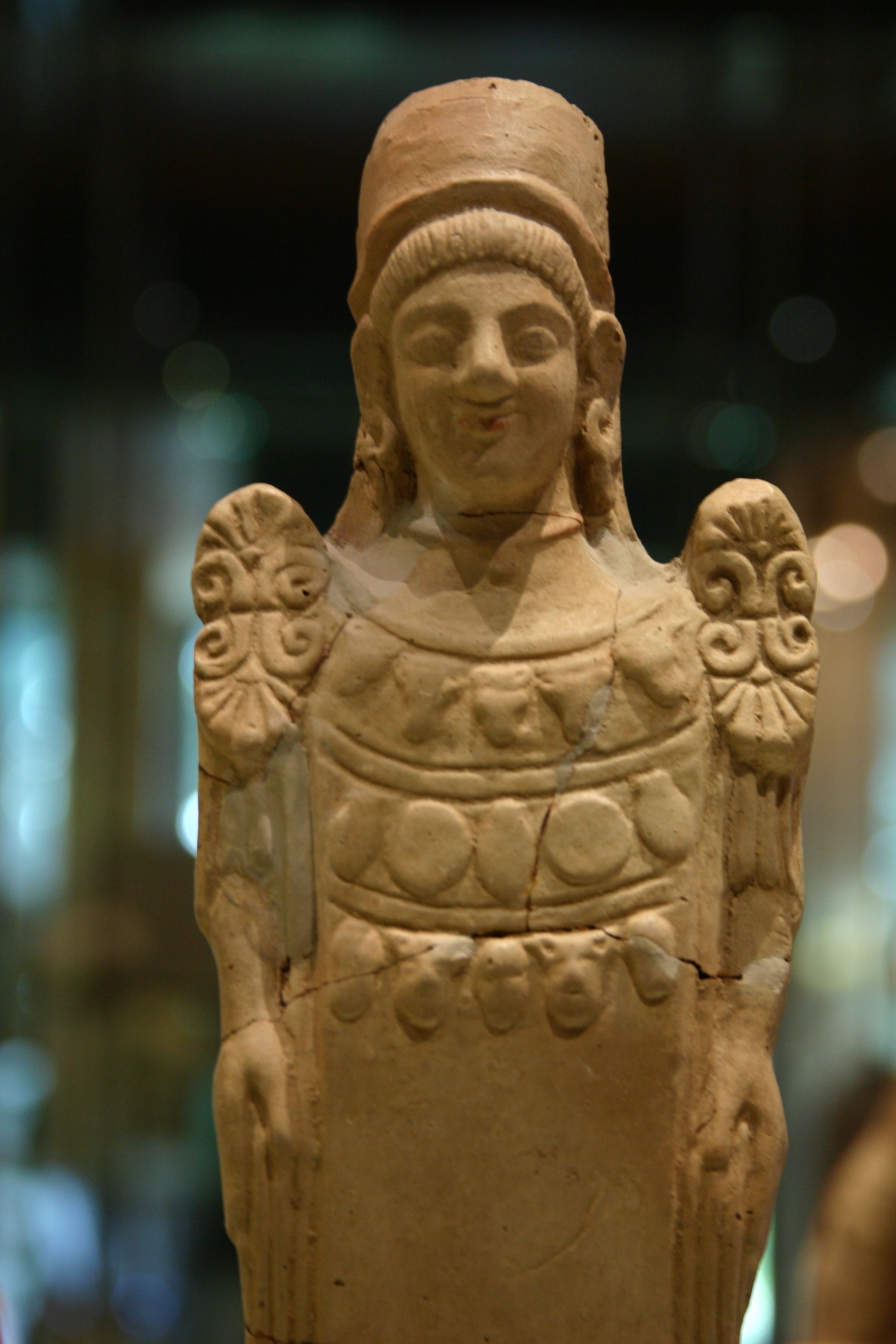 Museo Archeologico Regionale